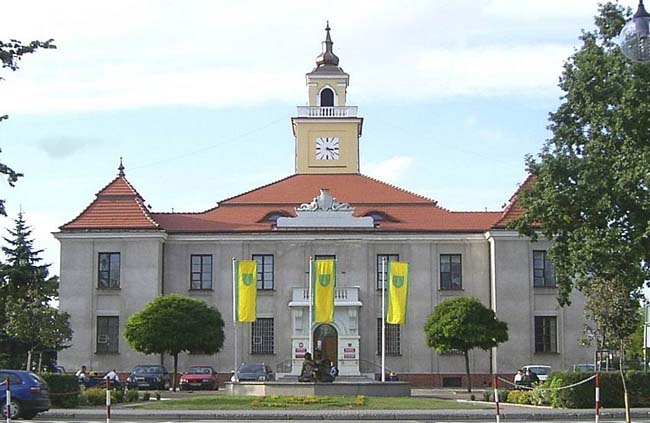 Ostrów Mazowiecka - ratusz, 1927